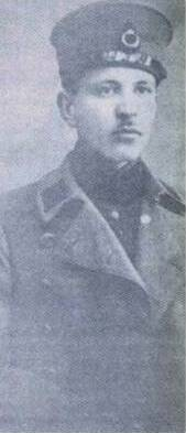 Atsız'ın, Askeri Tıbbiye yıllarına ait bir görsel